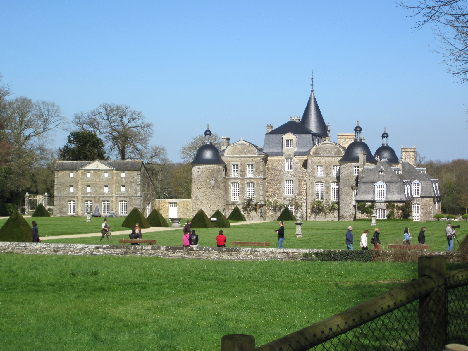 Façade ouest du château de la Bourbansais. Commune de Pleugueneuc, Ille-et-Vilaine, Bretagne, France.